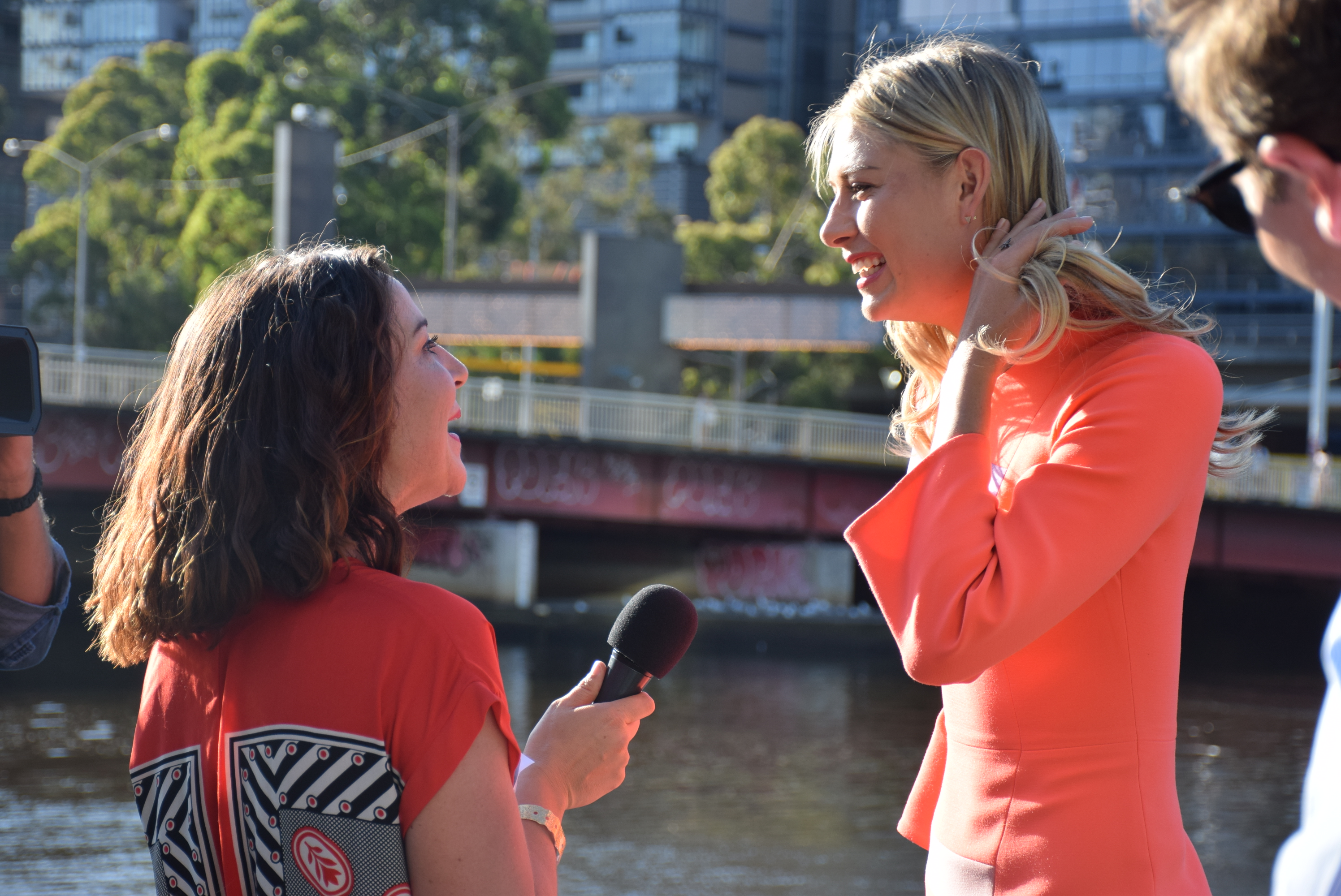 Maria Sharapova (Russia)